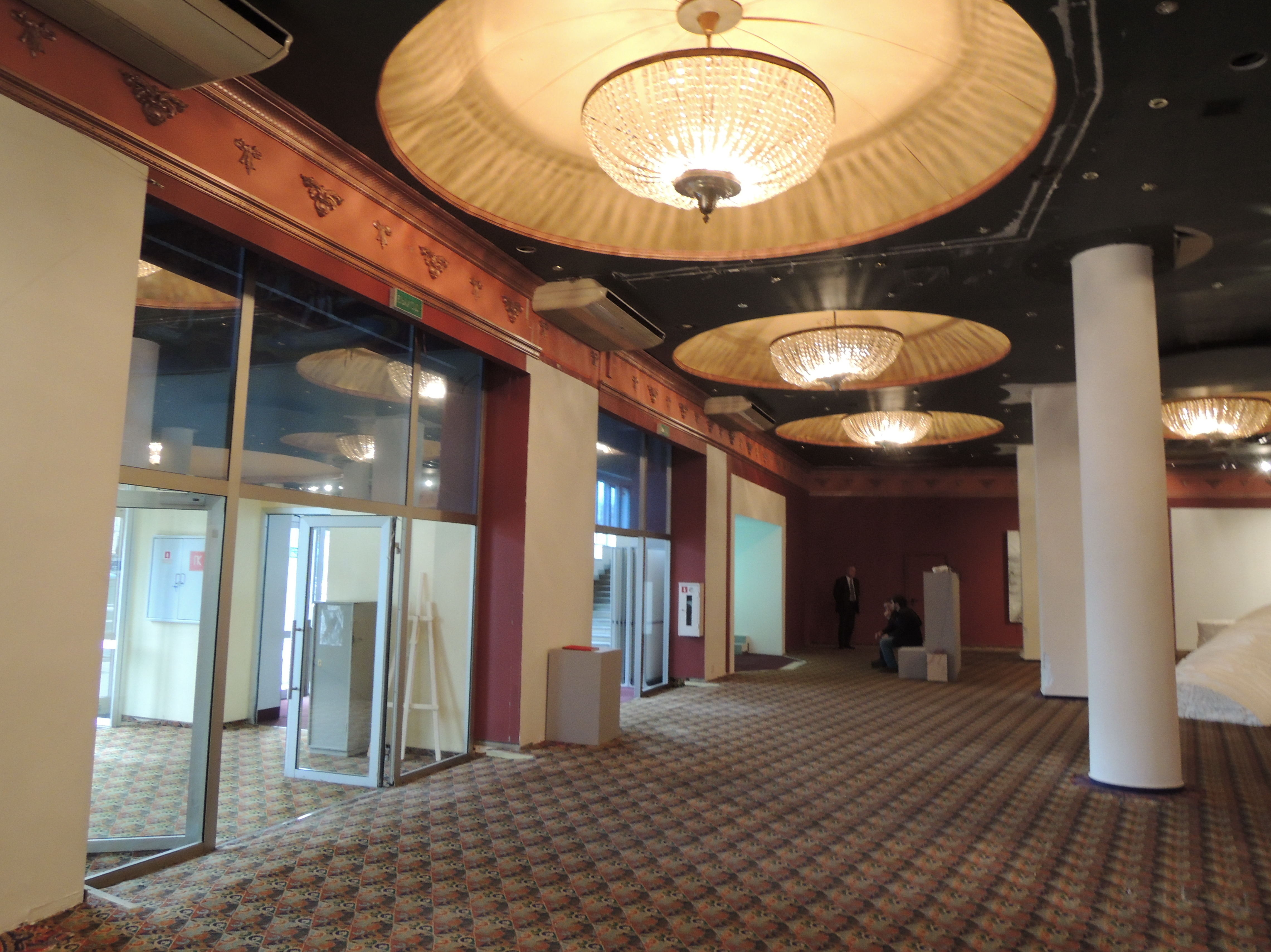 Кинотеатр "Ударник". 2012 год: сразу после того, как он стал собственностью фонда "Артхроника", которая начала производить реконструкцию интерьеров, в которых располагалось казино. Пресс-показ Премии Кандинского.